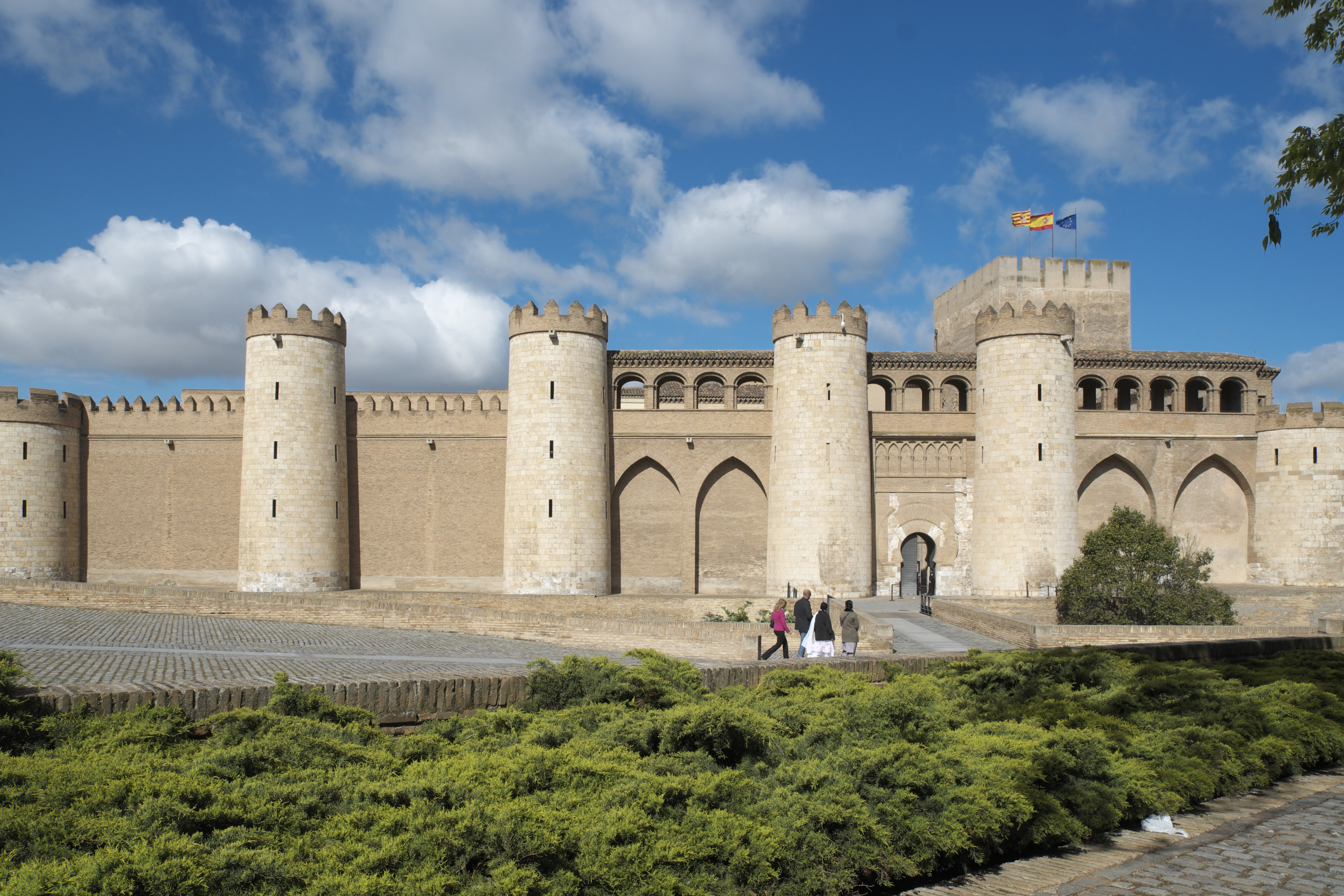 Palacio de la Aljafería in Saragossa (Aragón/Spanien), Mauer und Türme an der Ostseite